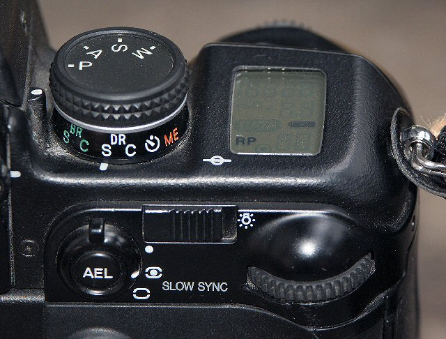 Minolta Dynax 9 - Kontrollelemente auf Gehäuserückseite (Fotografiert mit: Minolta Dimage 7 Hi)